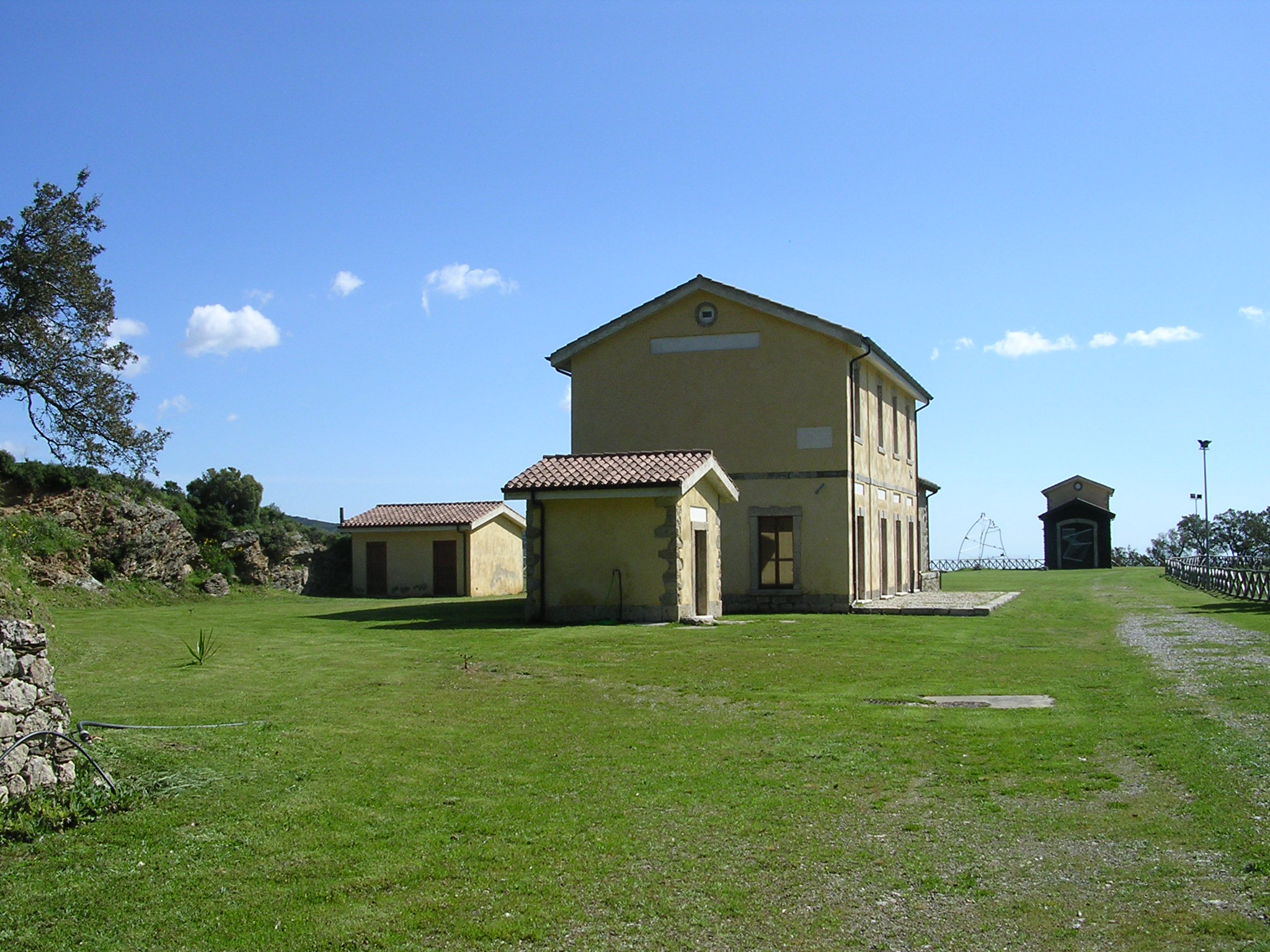 Museo "Stazione dell'arte", ospitato nell'ex stazione ferroviaria di Jerzu